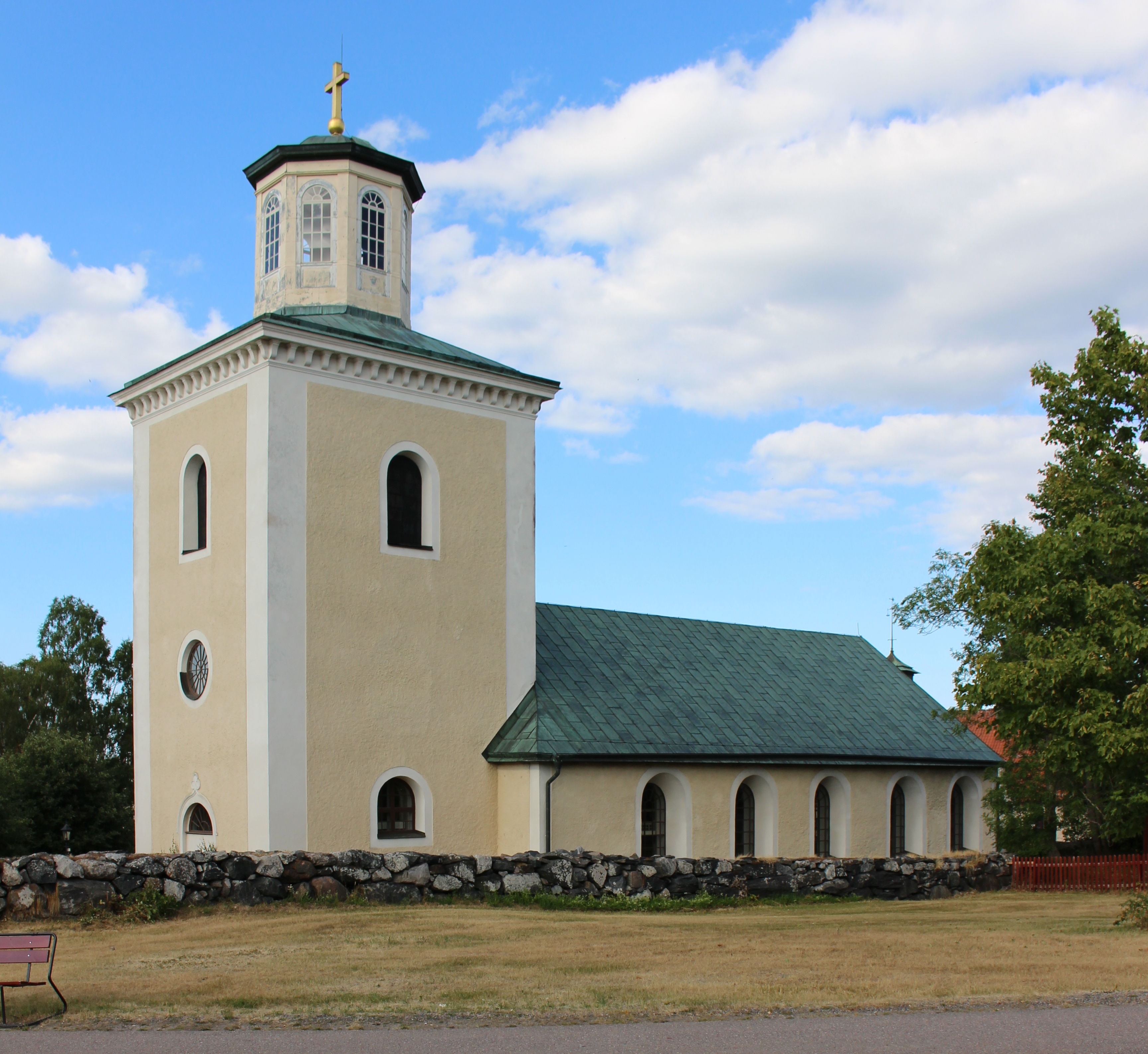 Östhammars kyrka.